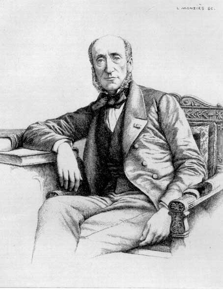 French economist Michel Chevalier (1806-1879)